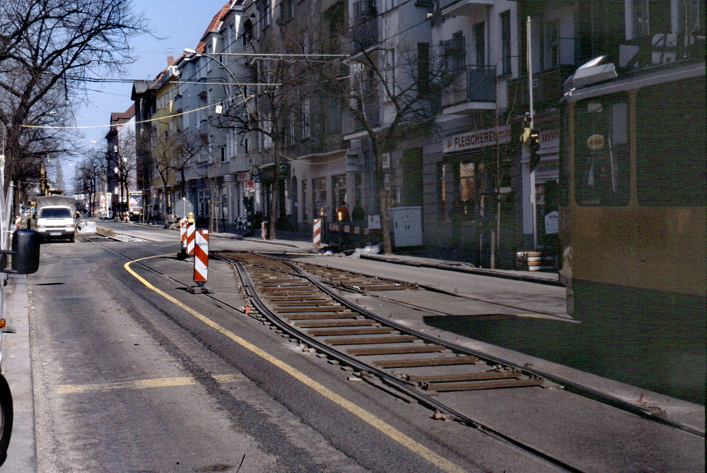 Kletterweiche während Bauarbeiten, Brückenstraße Berlin-Schöneweide